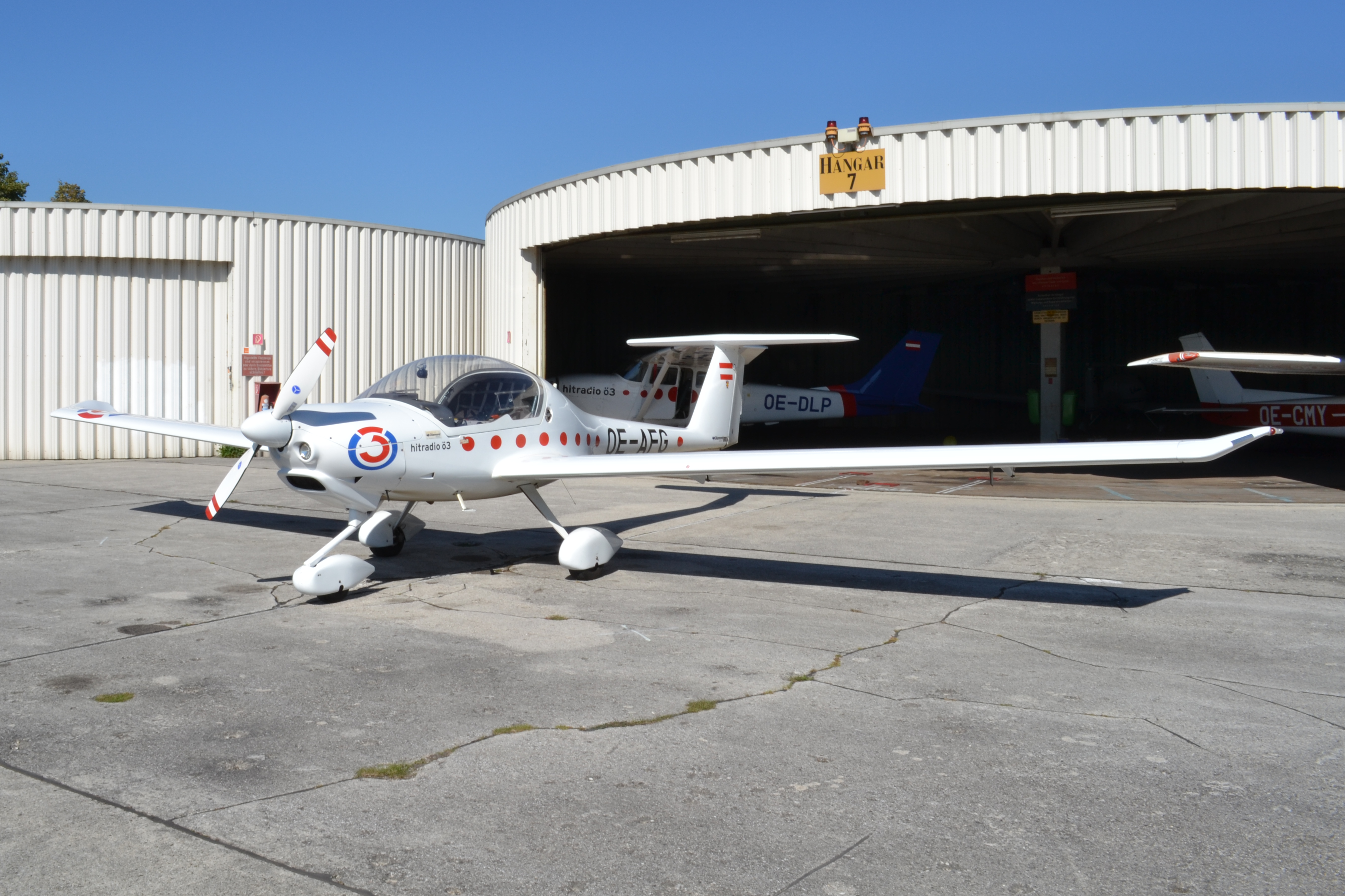 Diamond Aircraft DV-20 Katana, taken in LOAV, Bad Voeslau, operated by Fliegergruppe Wien